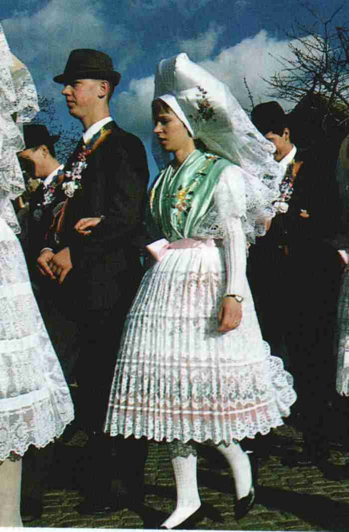 Zdjęcie Serbołużyczan